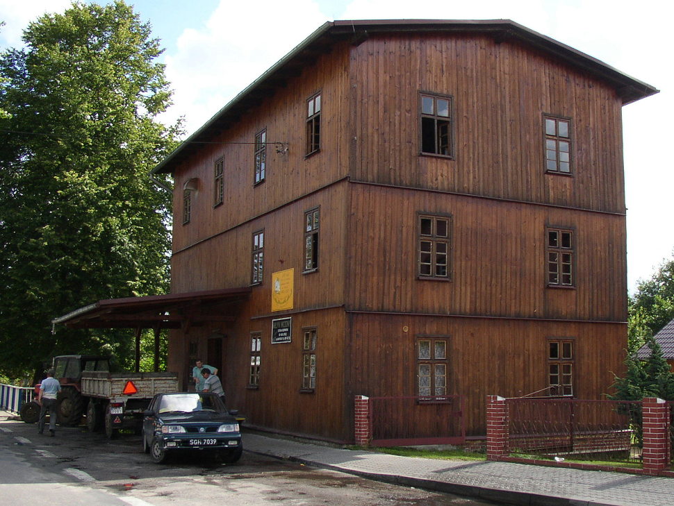 Lipusz, młyn wodny (2004)